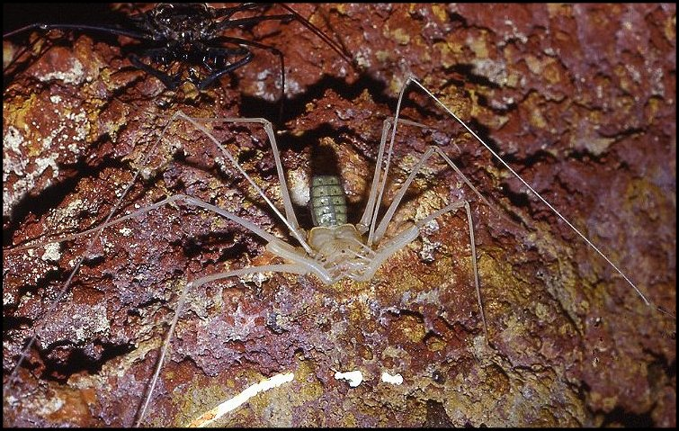 Heterophrynus longicornis venant de muer, grotte Fourgassié, Guyane.